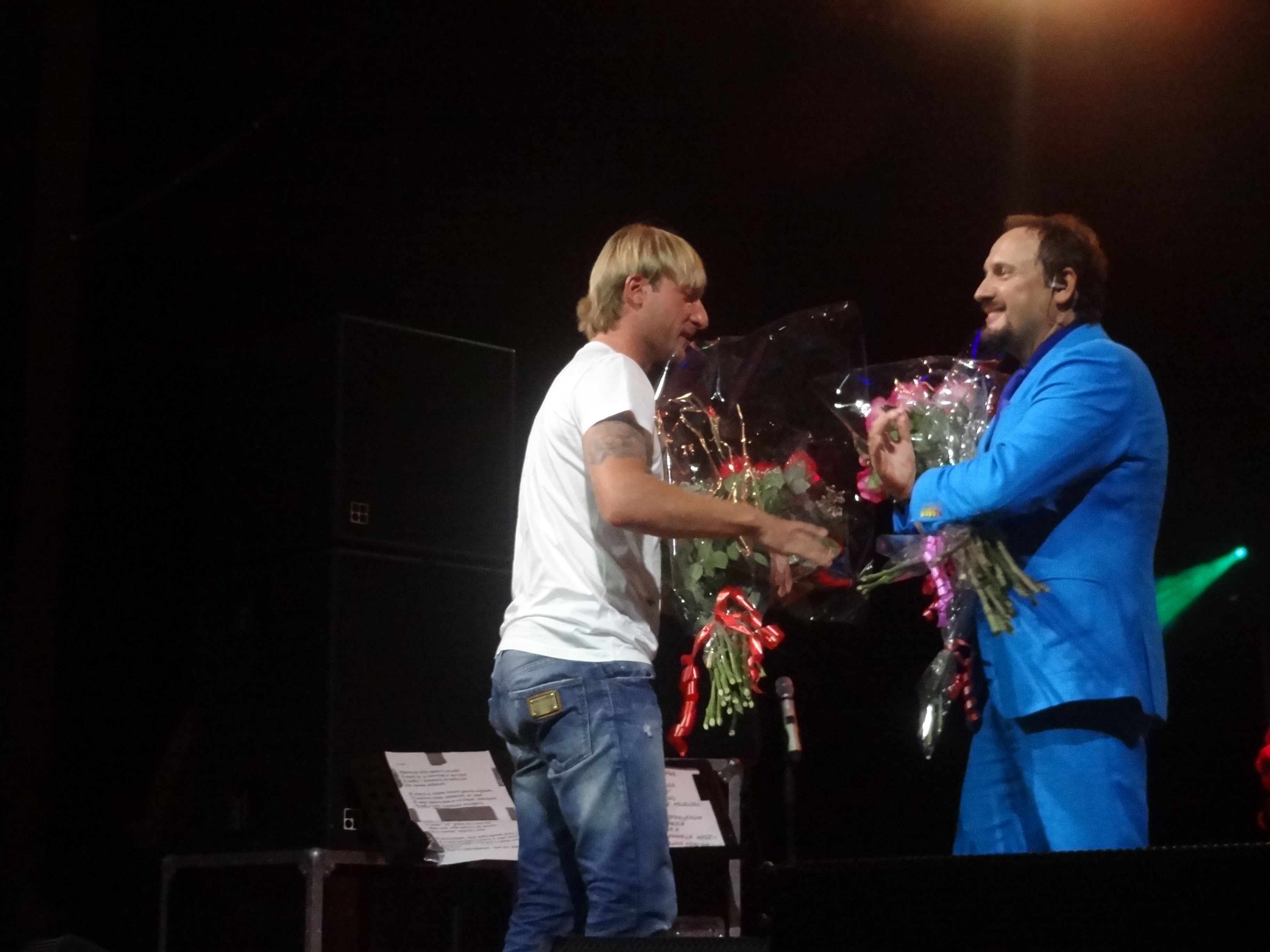 Евгений Плющенко дарит цветы Стасу Михайлову. Сочи, концертный зал "Фестивальный", 2014 год